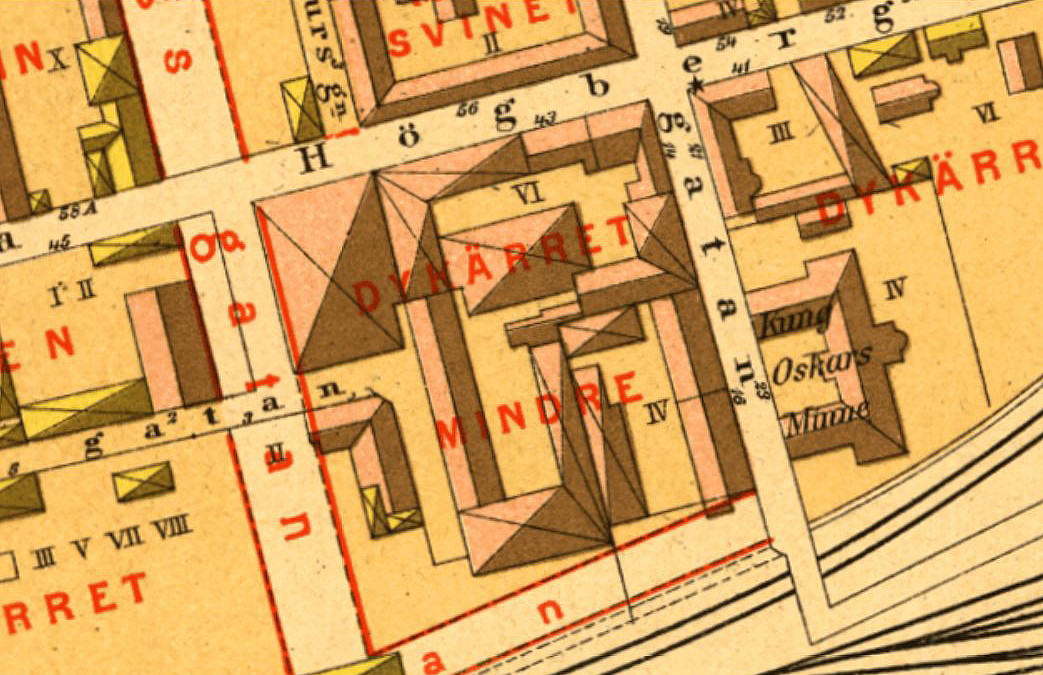 Del av Lundgrens Stockholmskarta visande kvarteret Dykärret Mindre